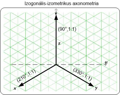 Izogonális-izometrikus axonometria